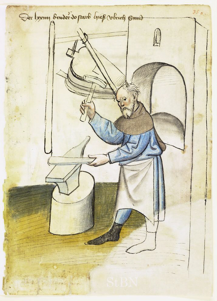 vlrich (Ulrich) Smid (Schmid) , Smid (Schmied) Transkription und weitere Informationen